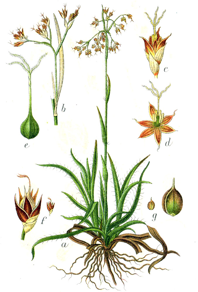 Luzula sylvatica subsp. sylvatica, syn. Luzula maxima (Reichard) DC. , nom. illeg. Original Caption Grosse Hainsimse, Luzula maxima